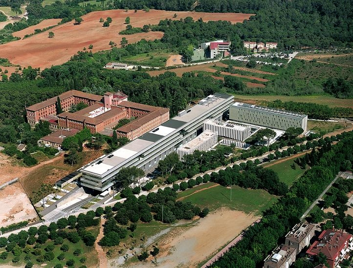 ESADE Sant Cugat aerial view